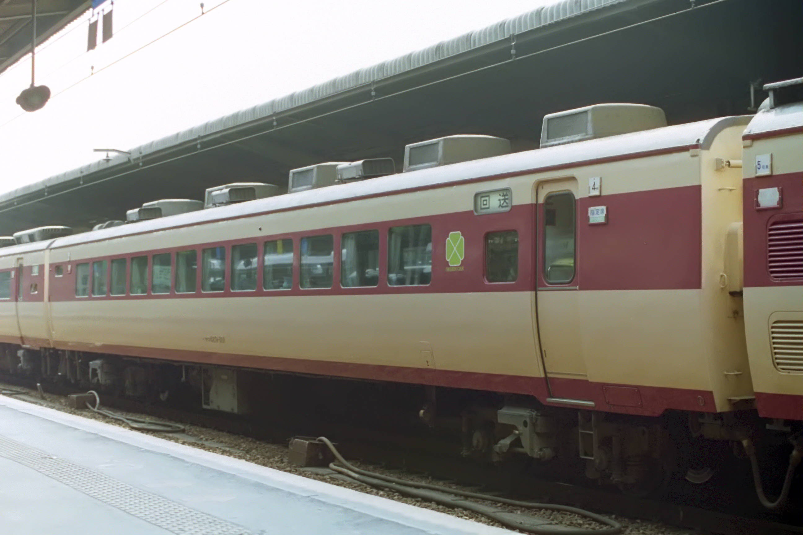 サロ489-101 大阪駅